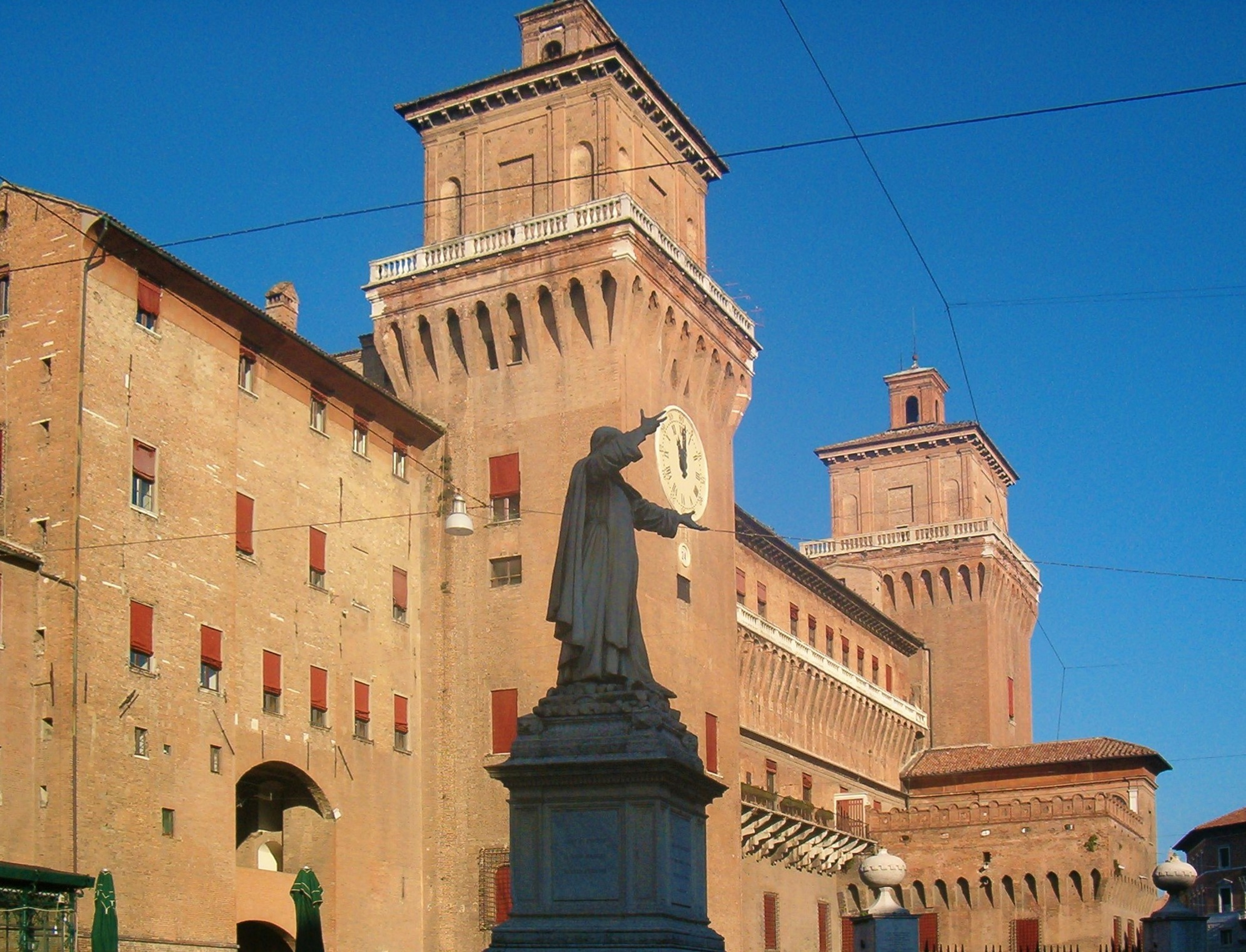 Statua di Girolamo Savonarola in Piazza Savonarola, a Ferrara, in una tipica inquadratura. Il frate sembra tenere tra le mani l'orologio posto sulla torre Marchesana del Castello Estense.